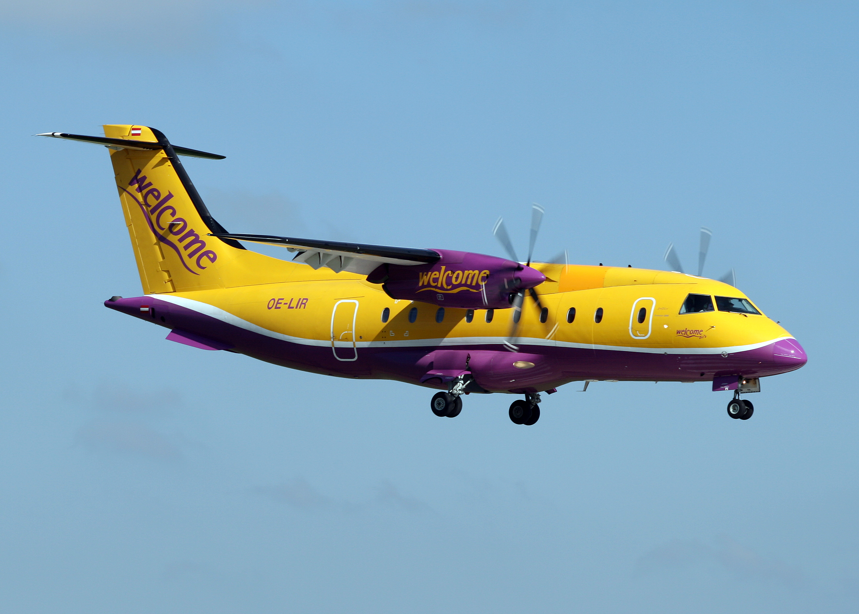 Haj / Eddv 05-05-08